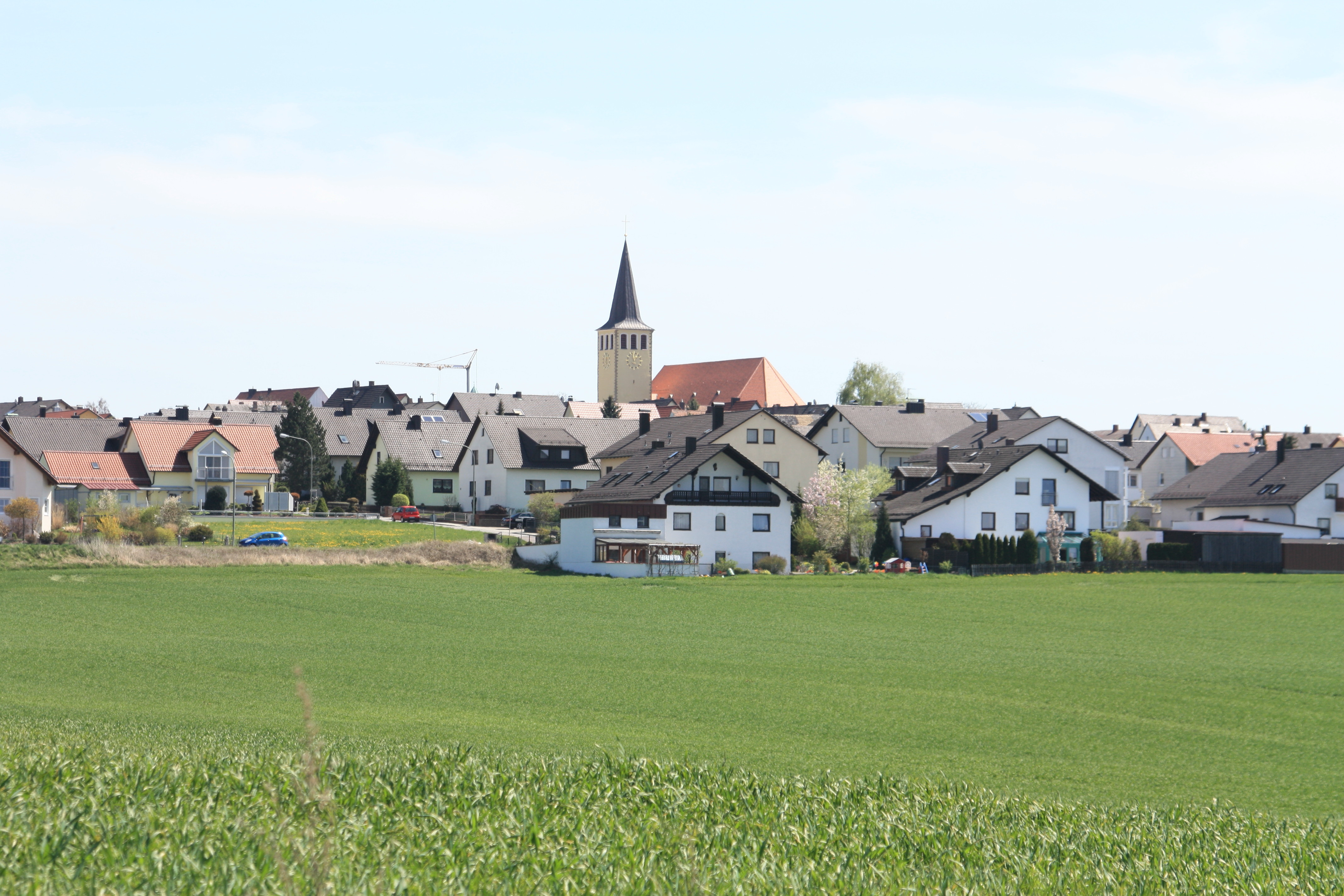 Wackersdorf von Westen